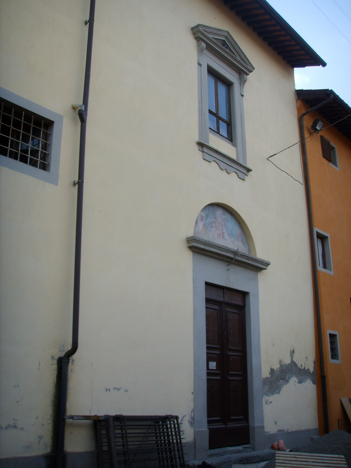 Chiesa_di_santa_chiara,_pisa